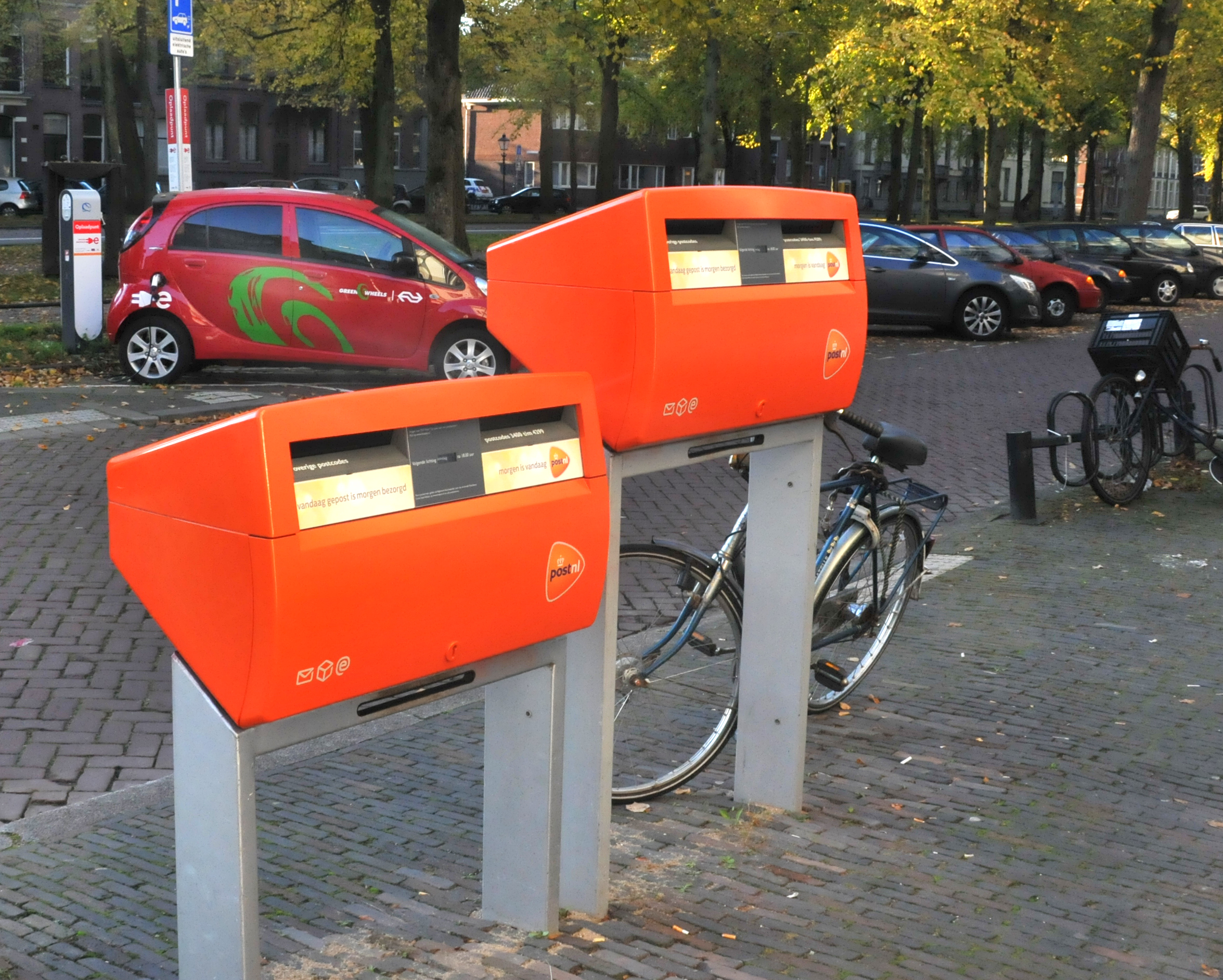 Post-NL brievenbussen op verschillende hoogte te Utrecht.